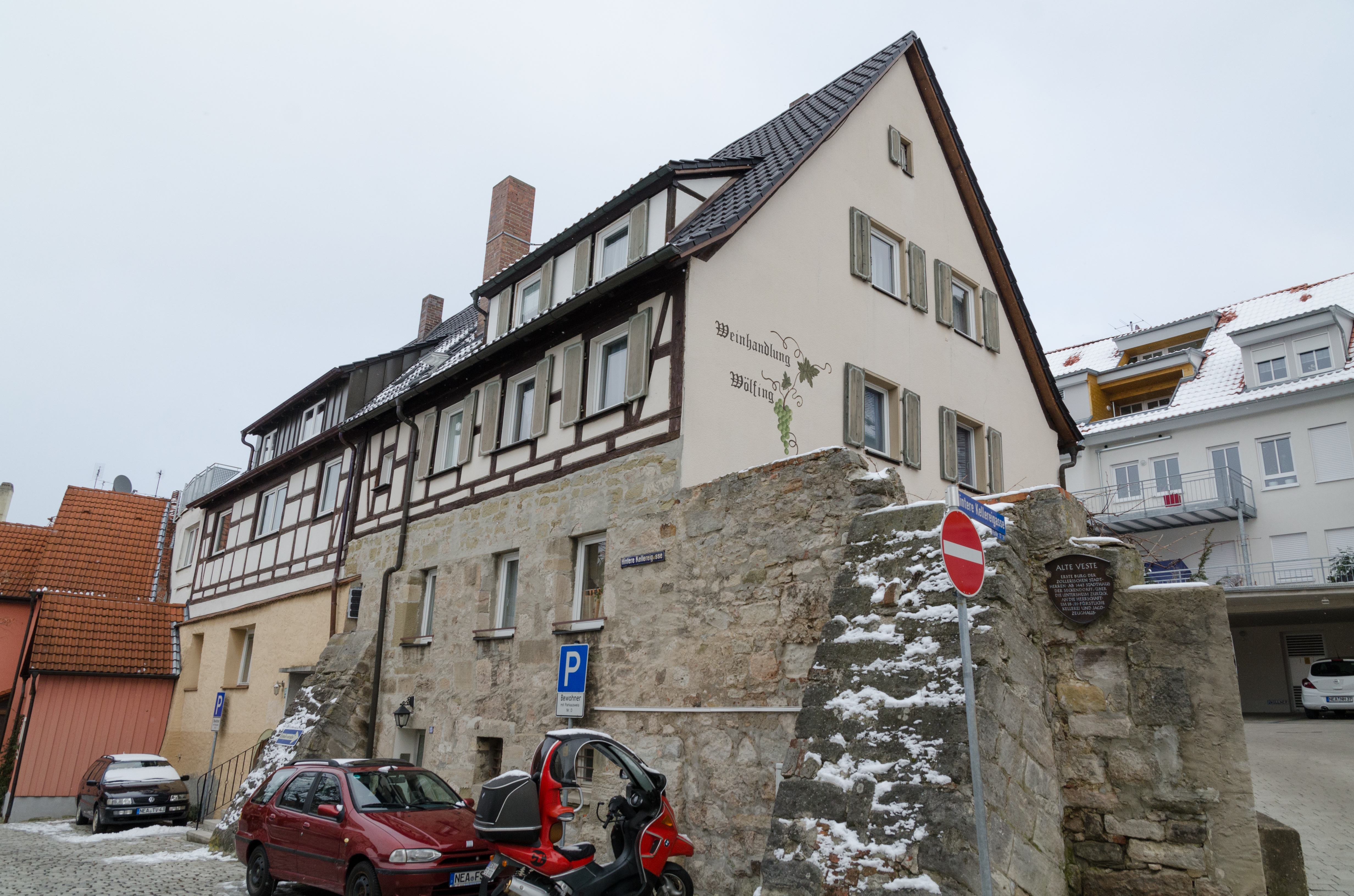 Neustadt an der Aisch, Hintere Kellereigasse 13 und 15